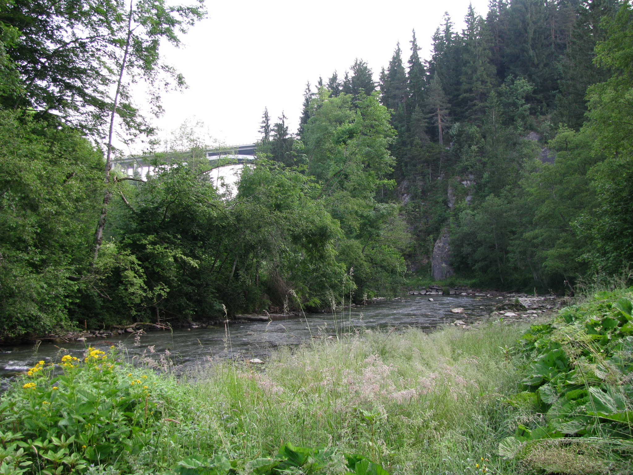 Wertachtal bei Maria Rain an der Landkreisgrenze Oberallgäu/Ostallgäu, im Hintergrund die Wertachtalbrücke der Bundesautobahn 7